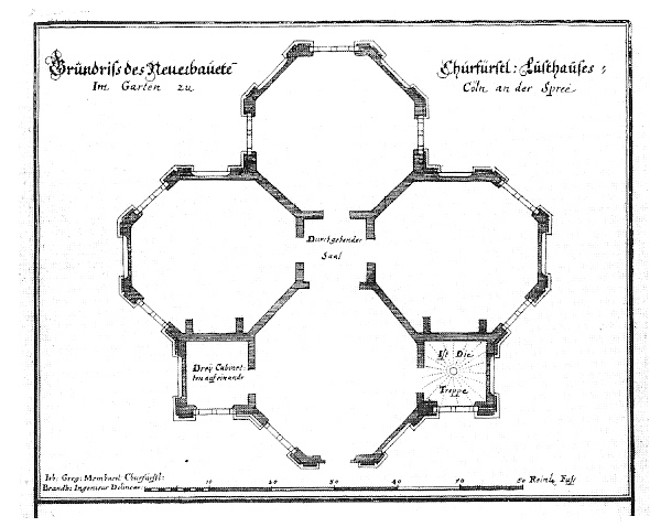 Grundriss des Neuen Lusthauses in Berlin-Cölln